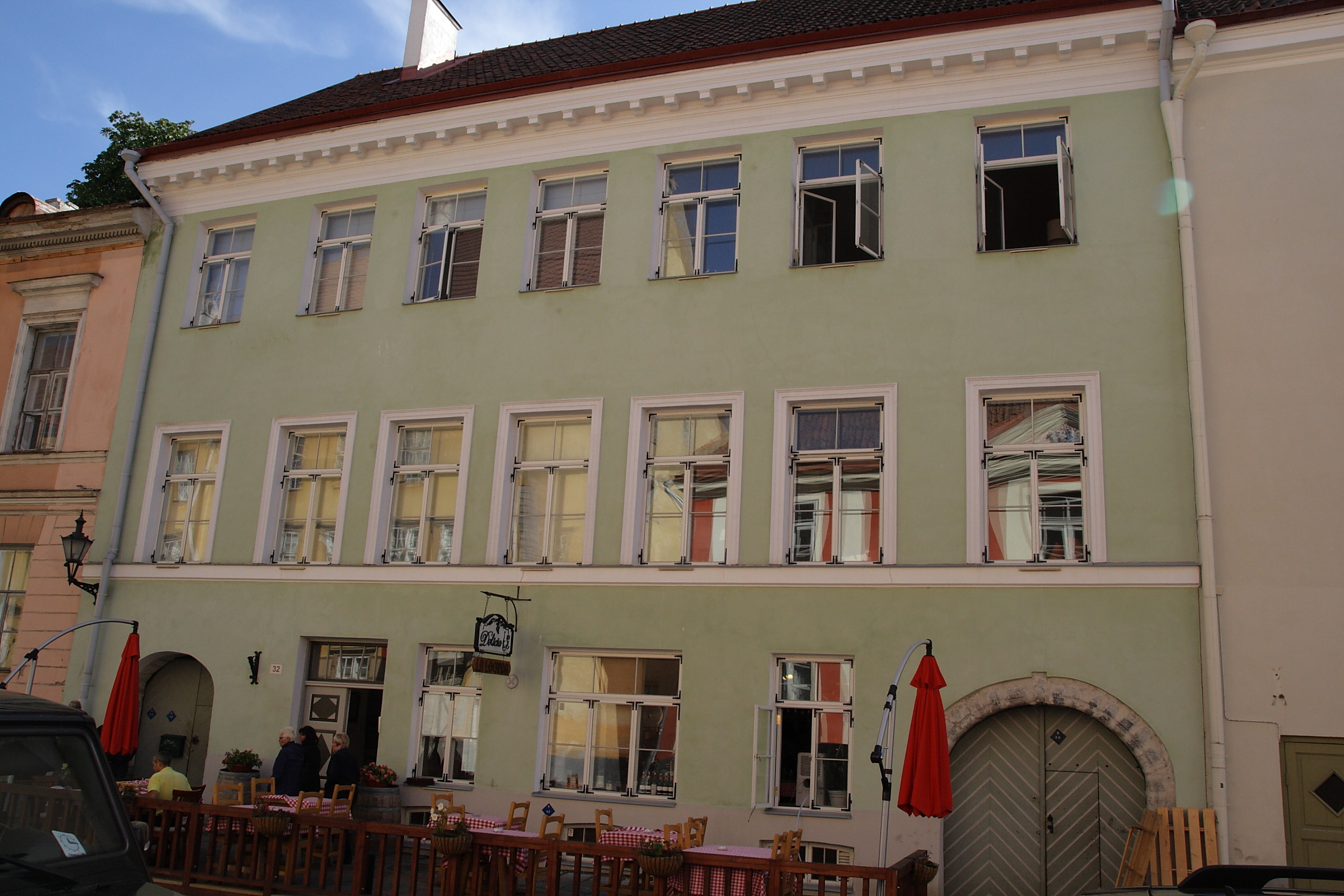 Tallinn, elamu Lai 32, 15.-19.saj